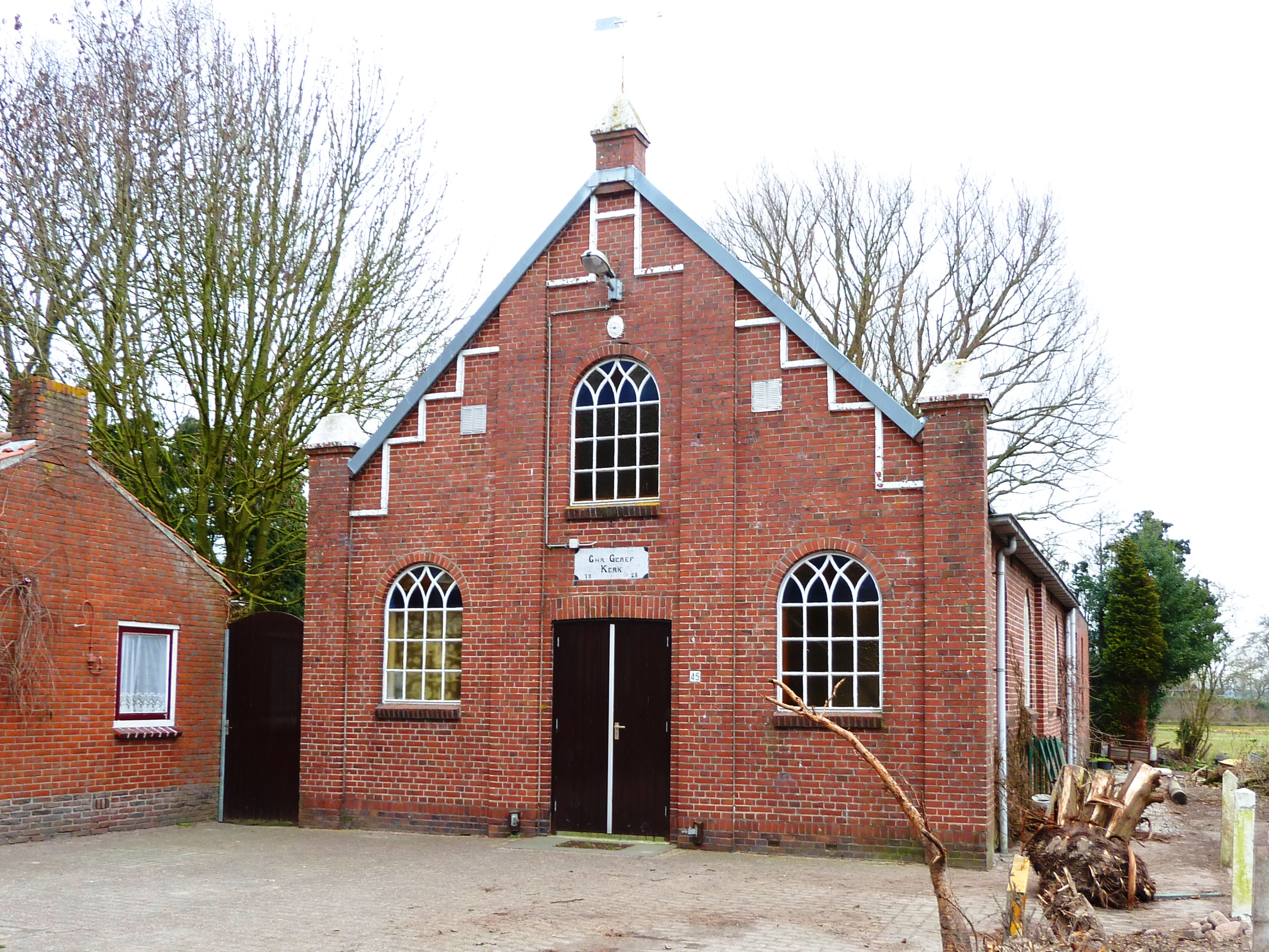 Voormalige christelijk-gereformeerde kerk (tot 1-1-2010) van Lutjegast (Grootegast, Groningen, Nederland)